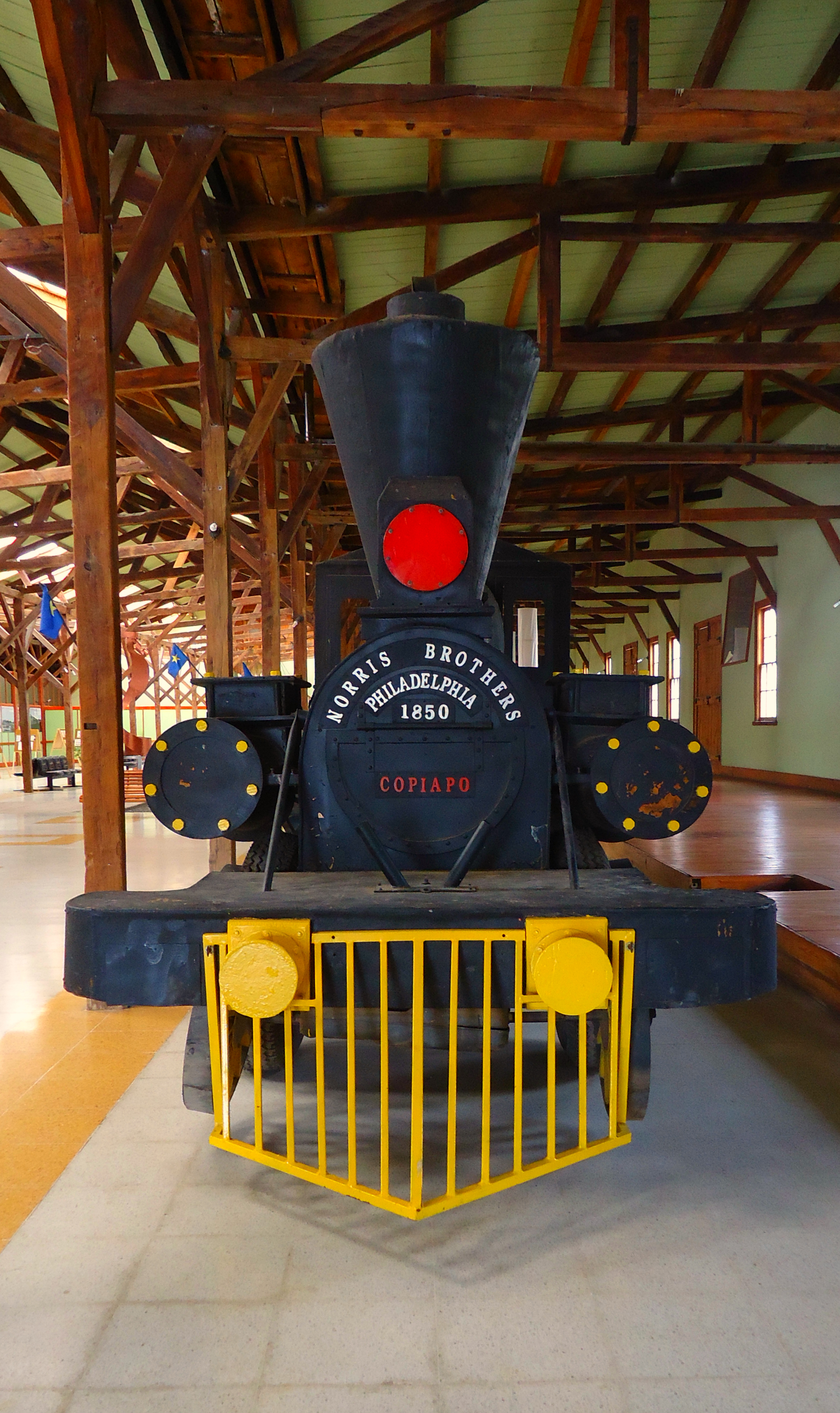 Estación de Ferrocarriles de Caldera This is a photo of a national monument in Chile: 561